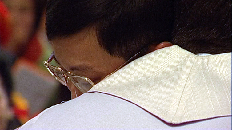 Image tirée de « Collection Premier Jour » de Fernand Melgar.